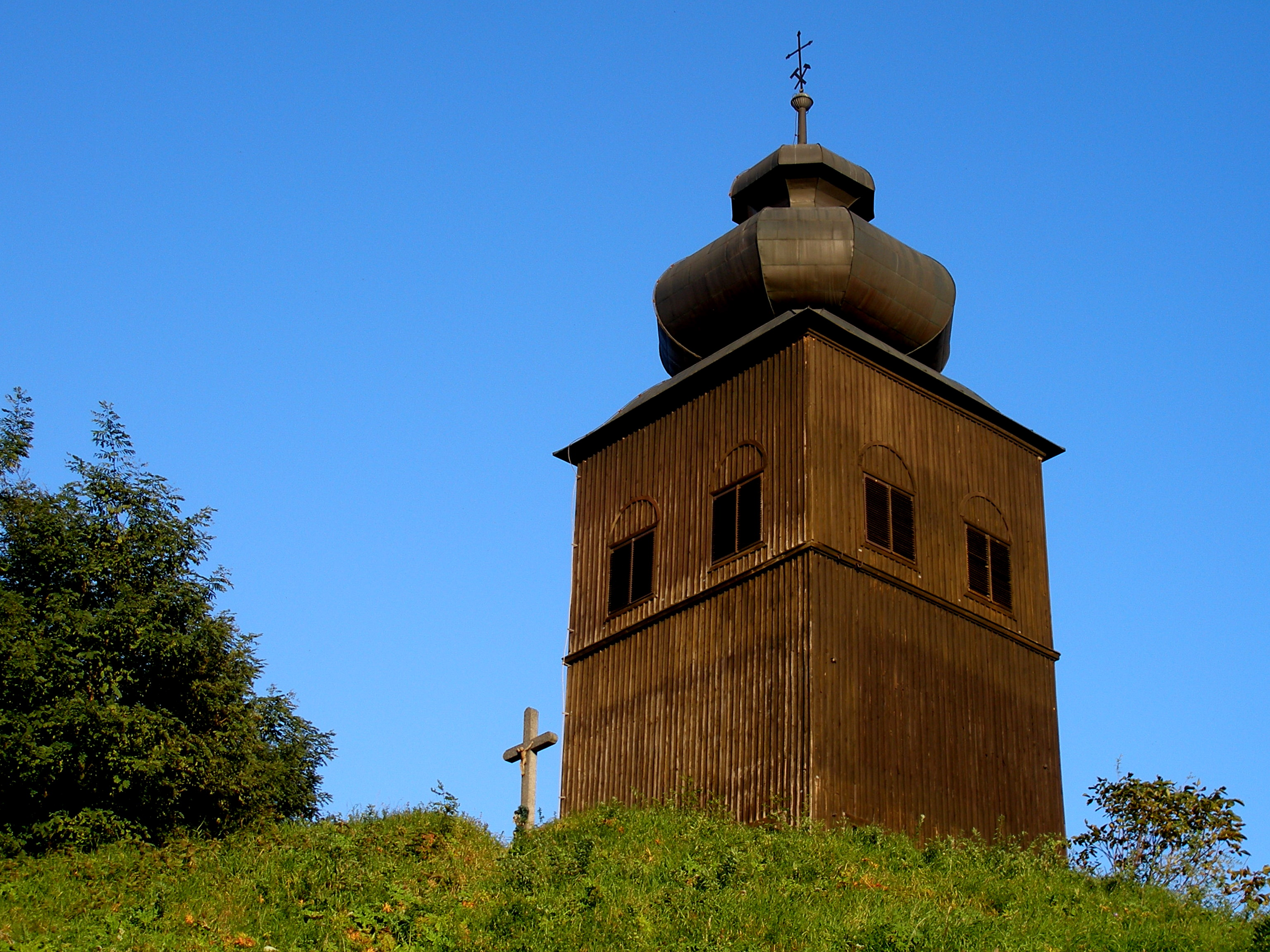 Rekonštruovaná banícka klopačka na ulici Pod Turňou. Mesto Prešov.